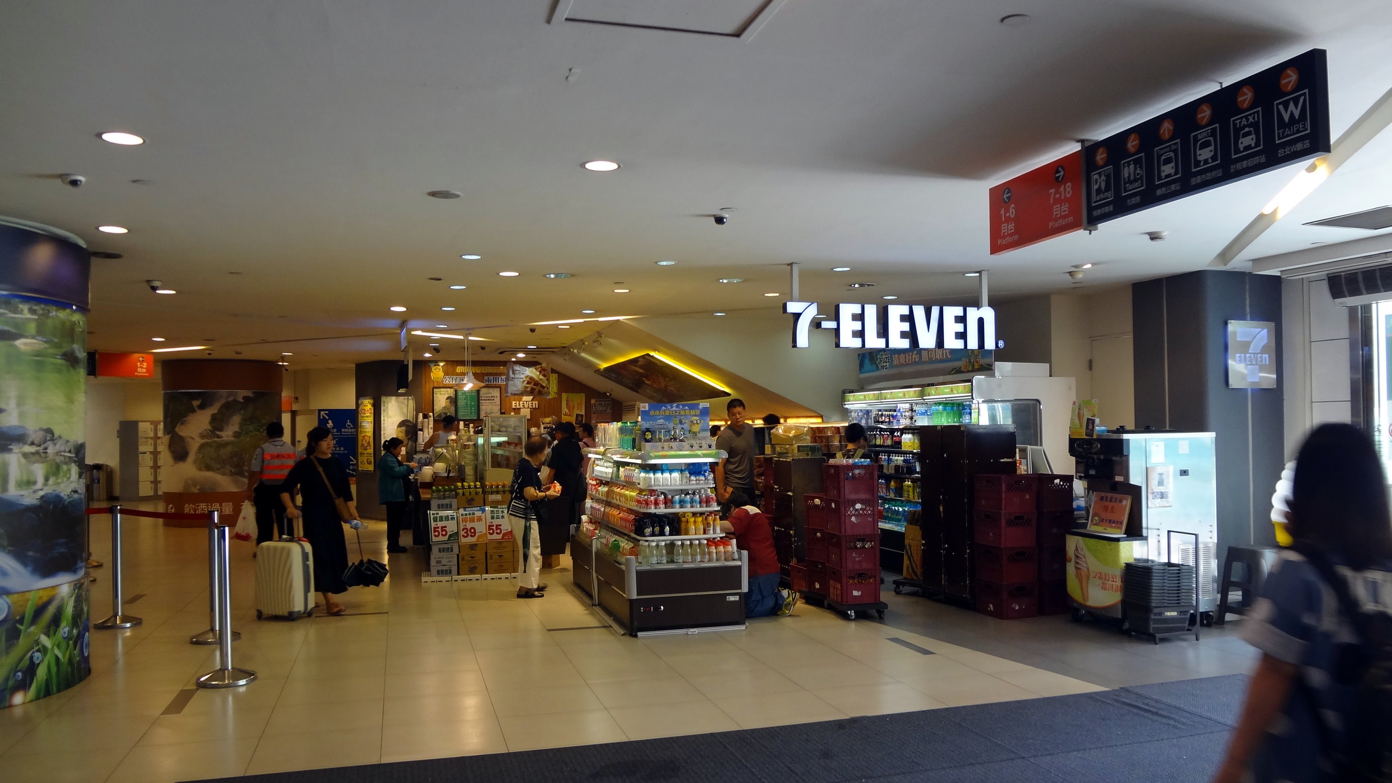 位於臺北市市府轉運站的統一超商市捷門市（店號990721），地址：臺北市信義區忠孝東路五段6號1樓。